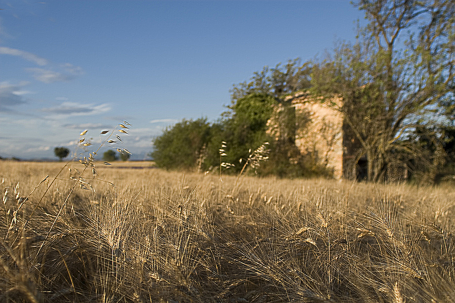 Champ de blé et cabanon en ruine à Valensole